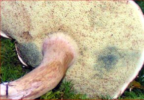 Boletus badius, syn. Xerocomus badius - Boletaceae